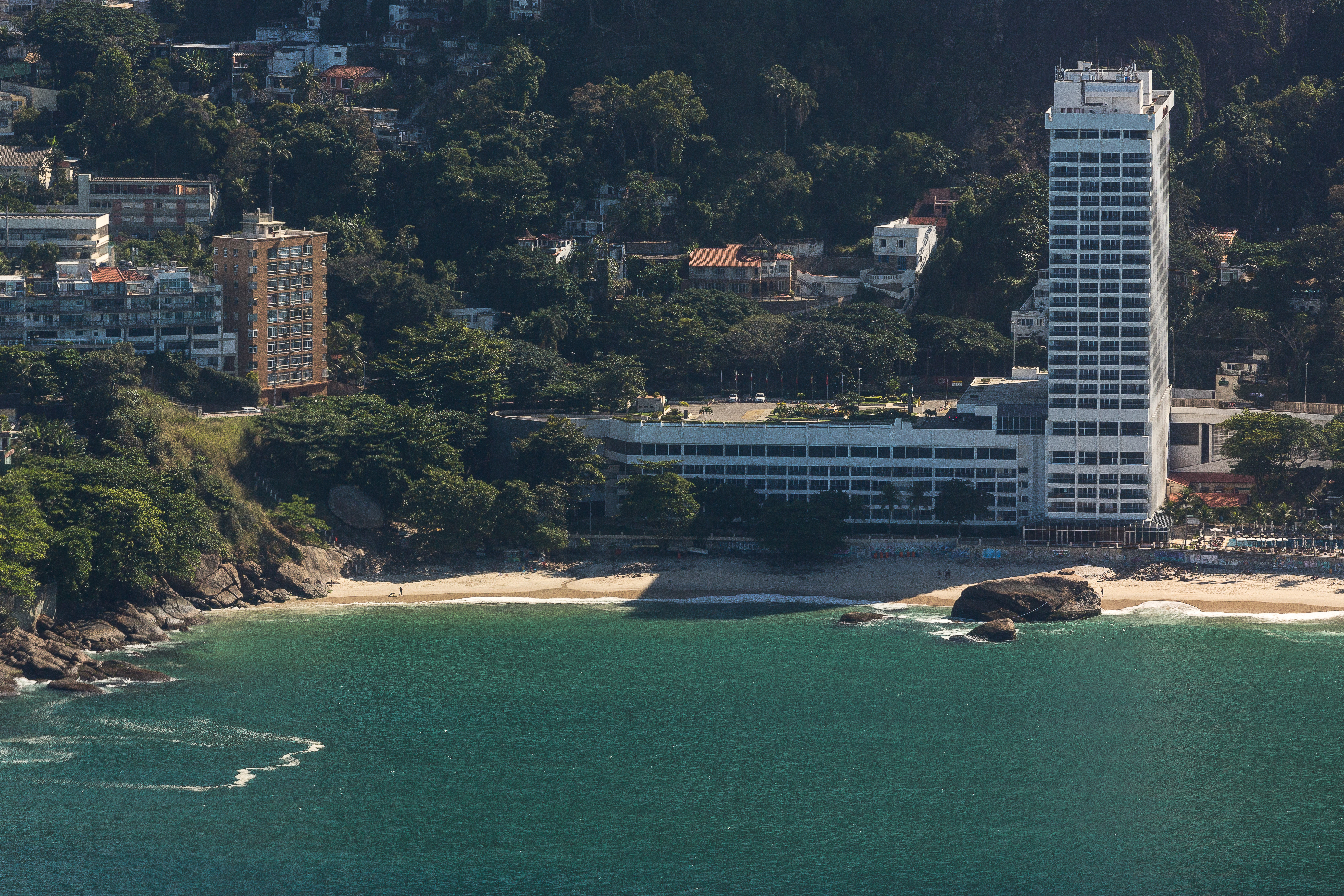 Vista aérea do Sheraton Grand Rio Hotel & Resort e da Praia do Vidigal. Rio de Janeiro - RJ - Brasil.